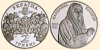 2 гривні: Монета із зображенням Катерини Білокур